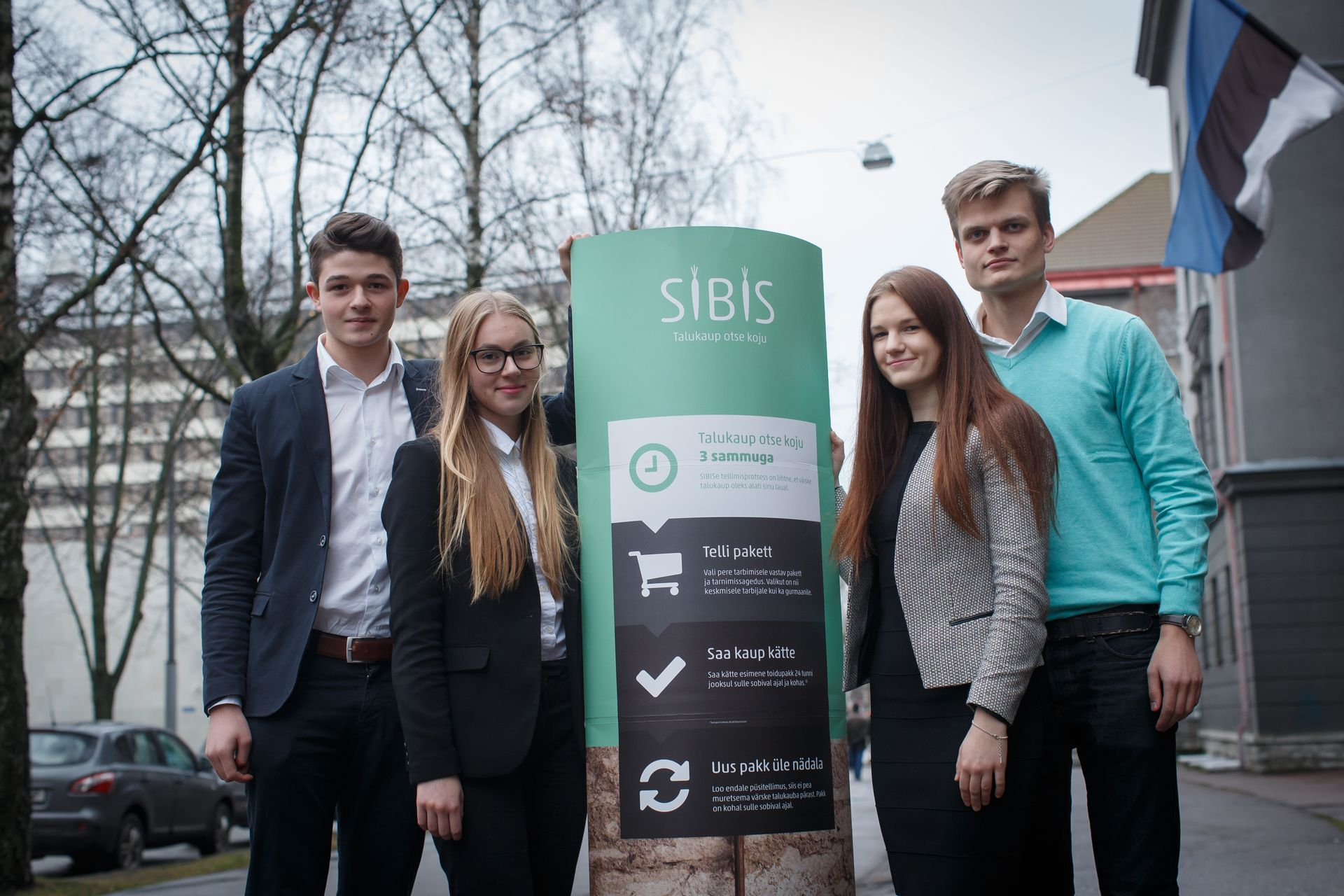 SIBISe meeskond